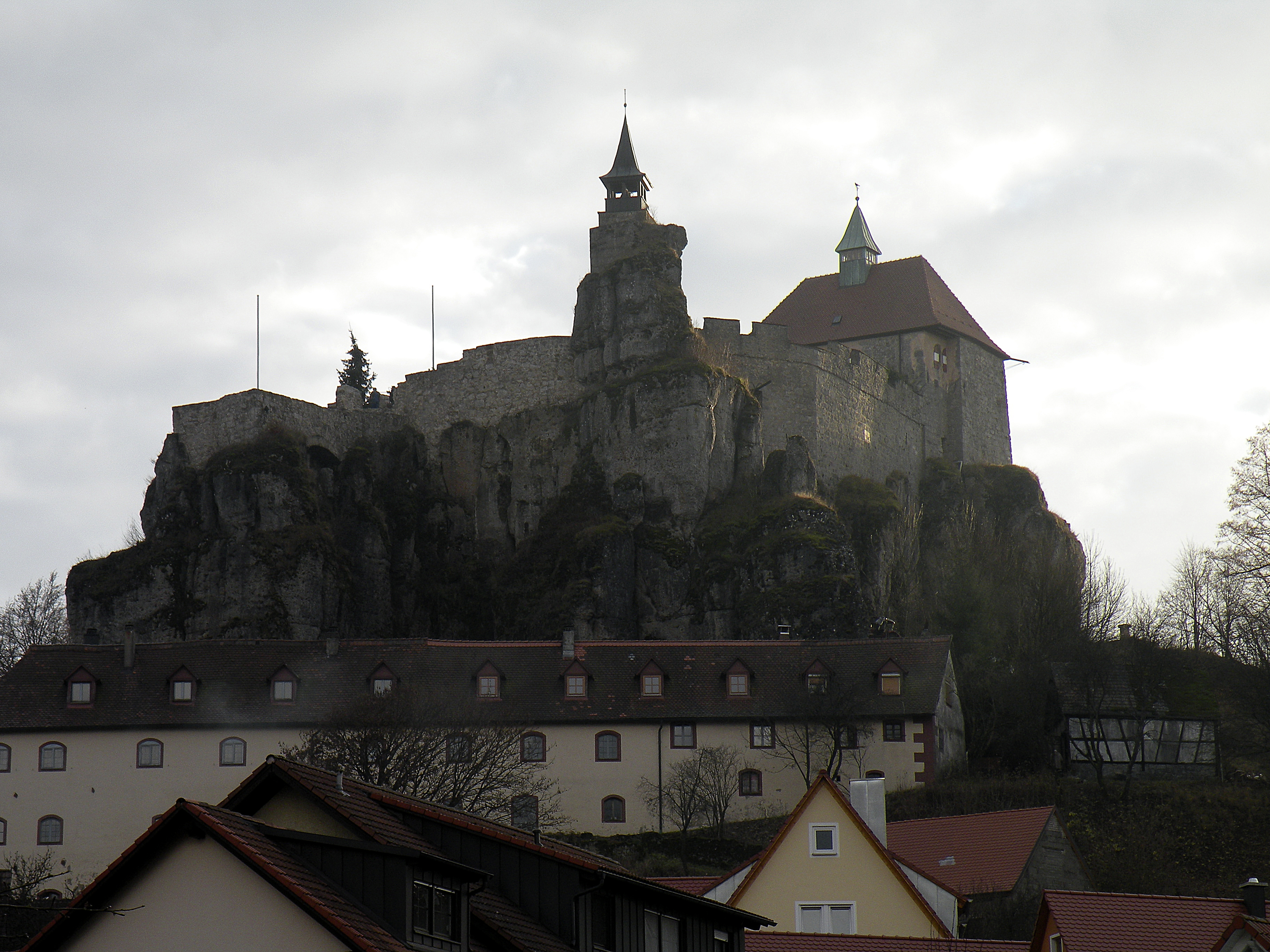 Замок Хохенштайн